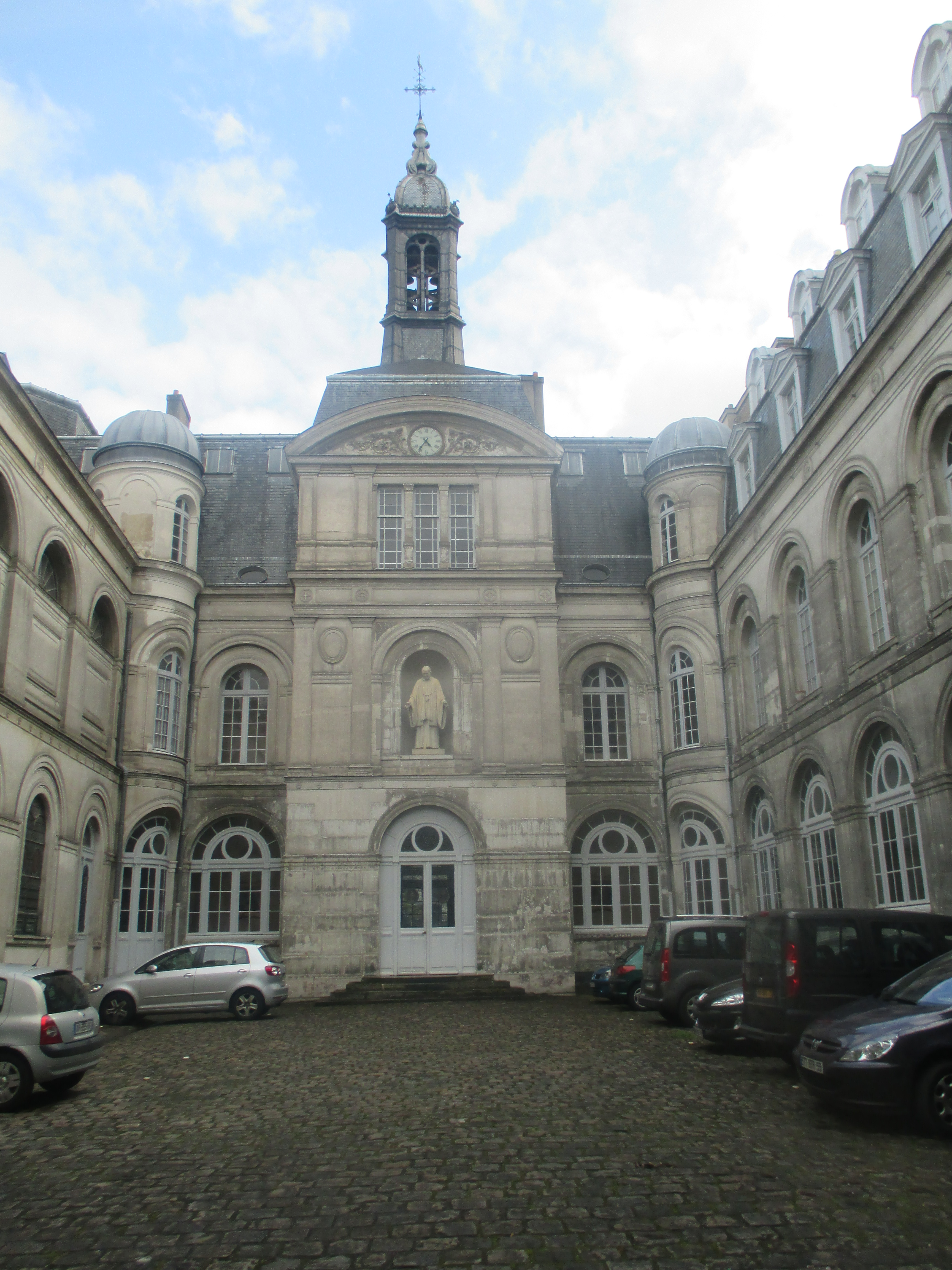 Maison mère des lazaristes (congrégation de la Mission), rue de Sèvres à Paris.